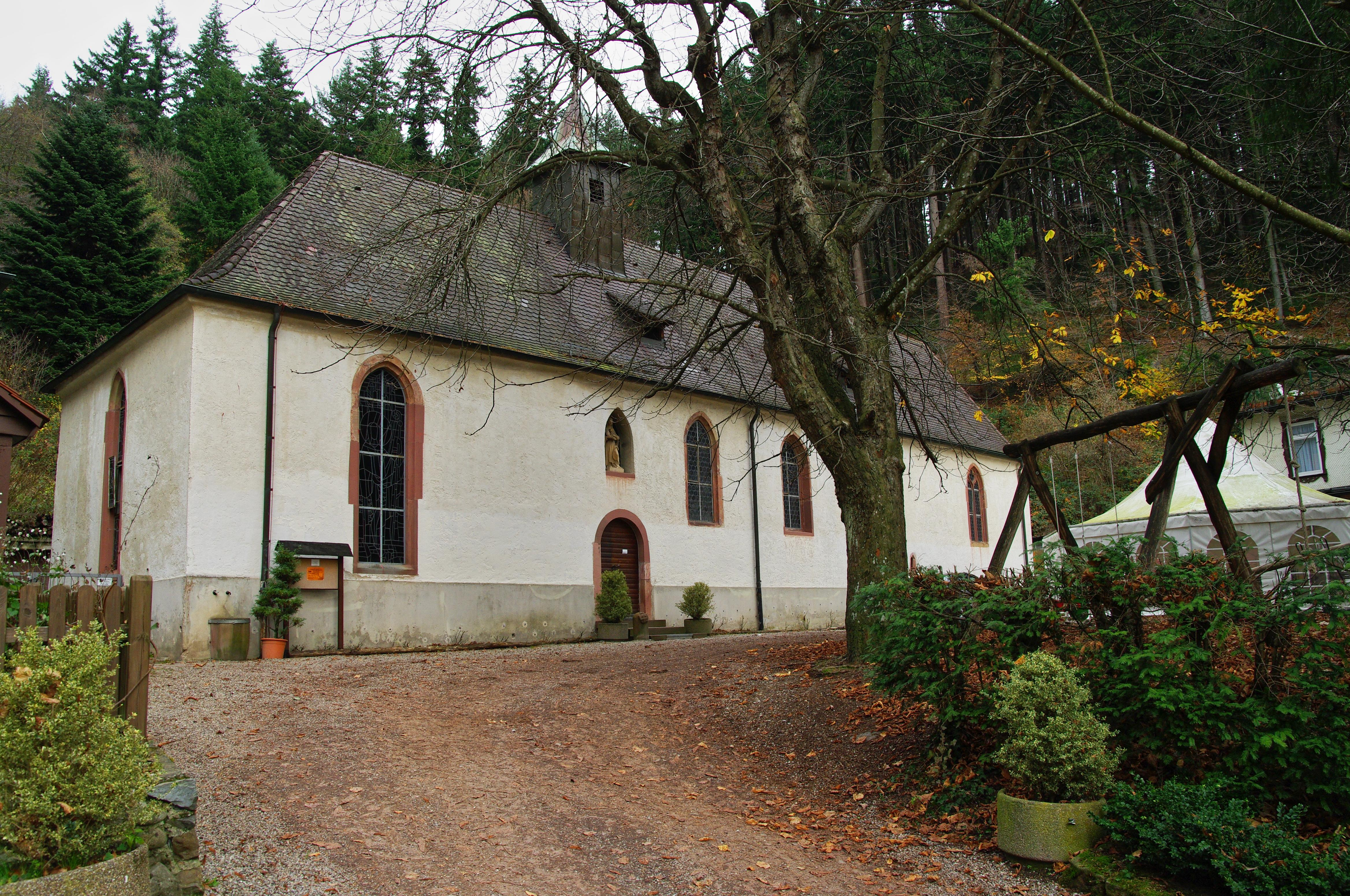 Die Kirche. Die Kapelle befindet sich unterhalb des linken großen Fensters